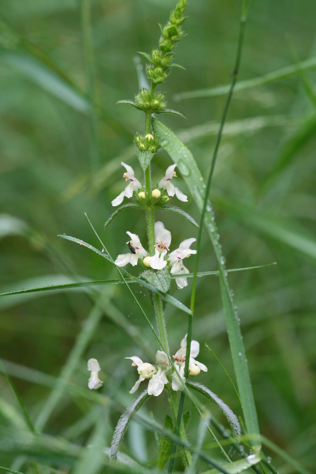 Aufrechter Ziest (Stachys recta)